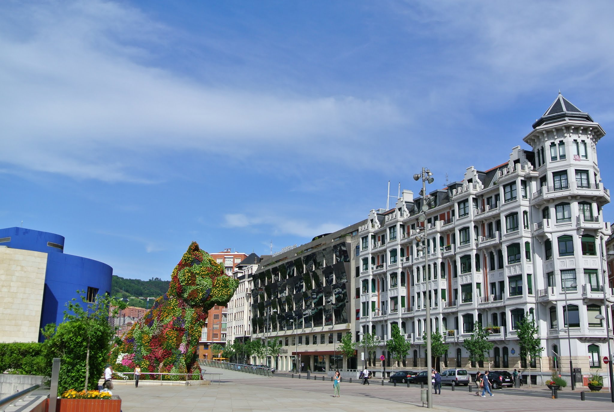 Indautxu, Bilbao, Biscay, Spain